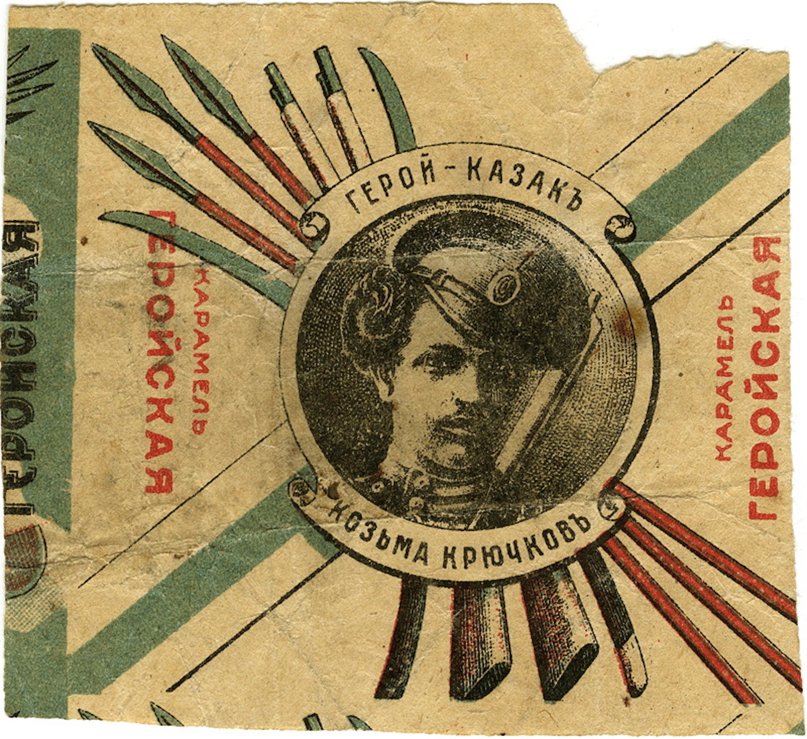 Карамель «Геройская»